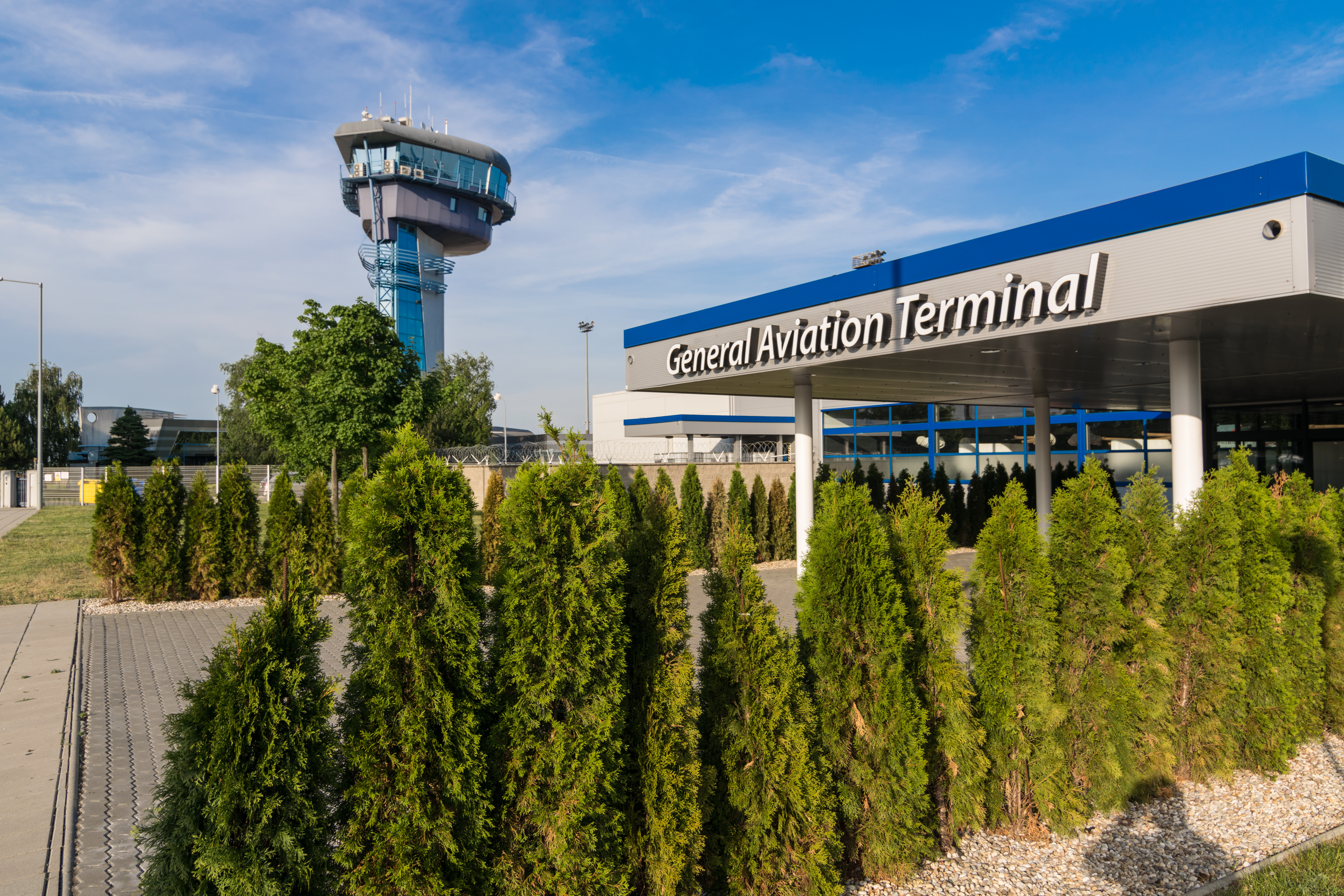 M. R. Štefánik Airport